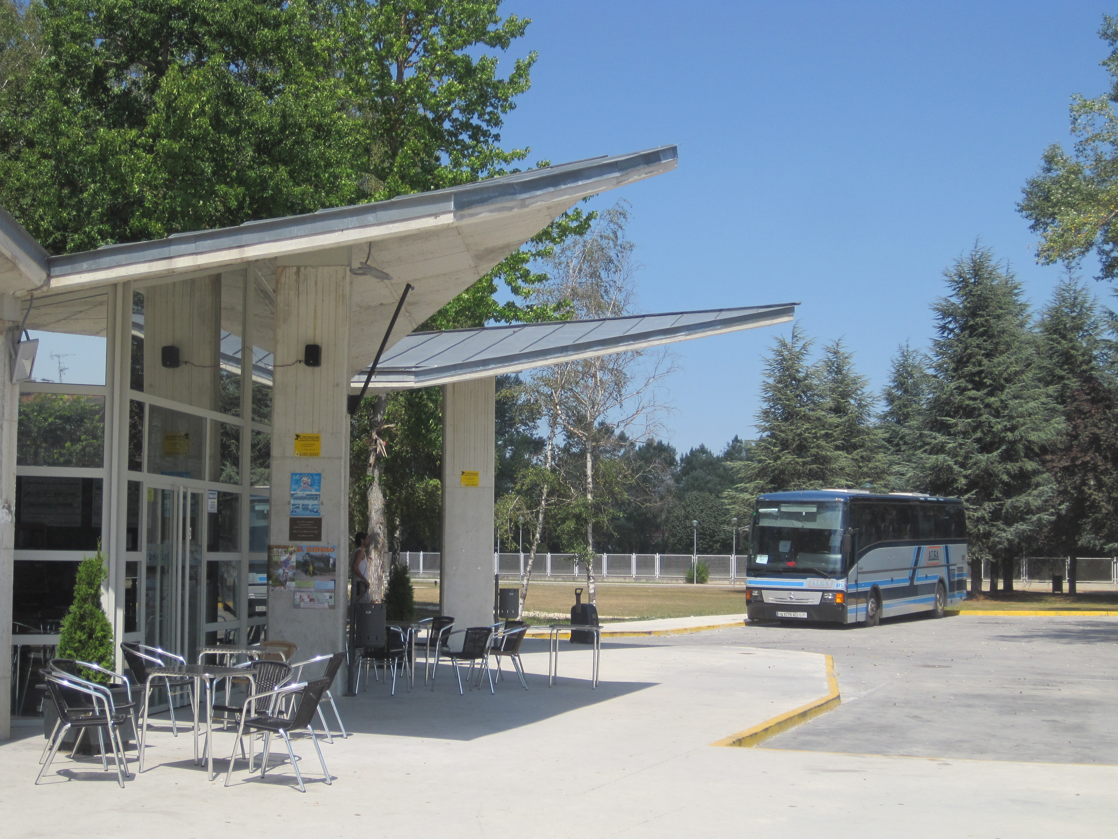 Vista de la Estación de Autobuses de Villarcayo.